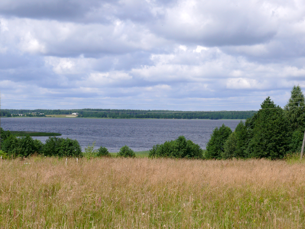 Usmas ezers, ziemeļu gals - skats no ceļa pie "Usmenieku" mājām. Fotogrāfējis A.Buks.